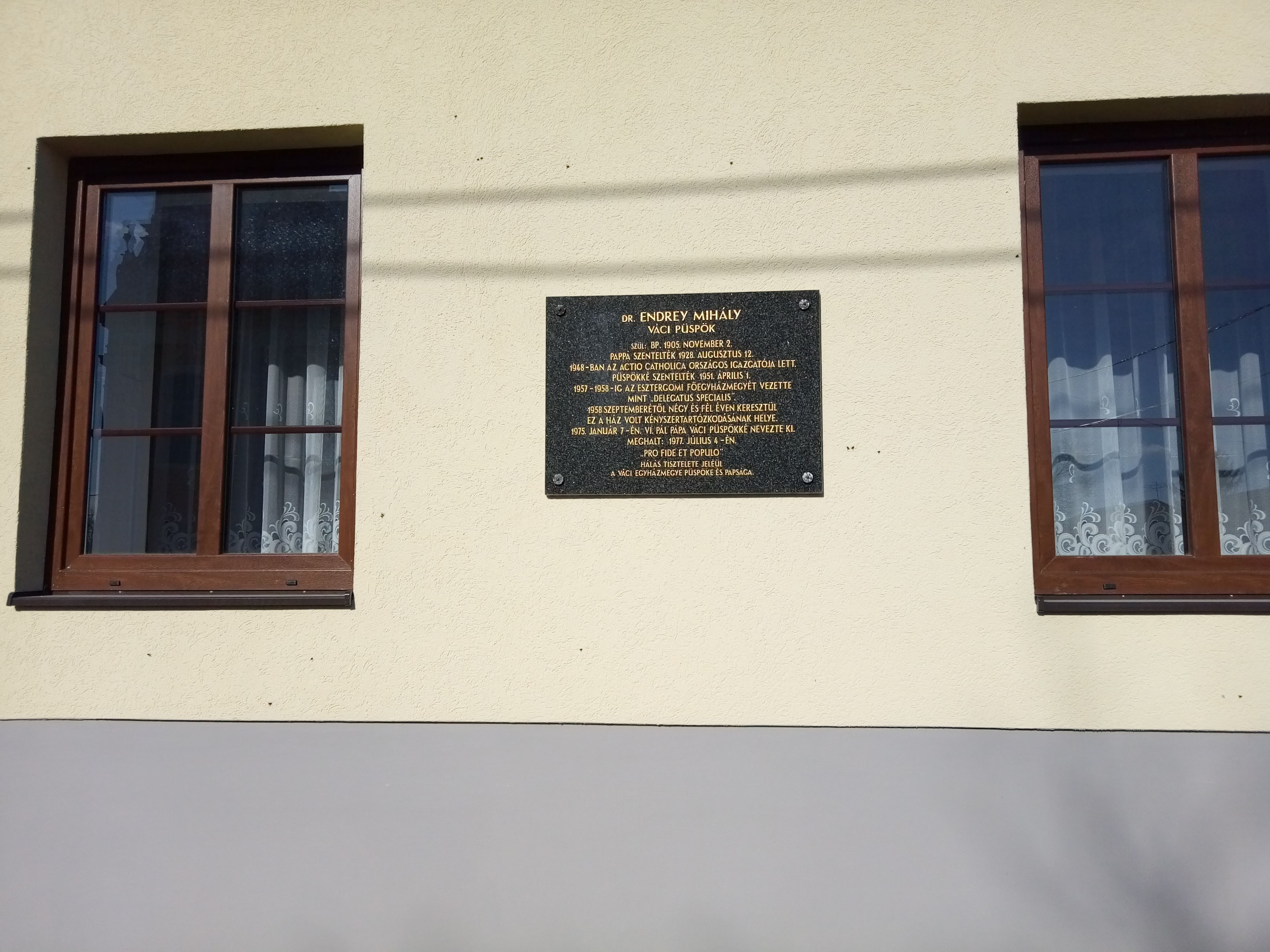 Endrey Mihály emléktábla Vámosmikolán